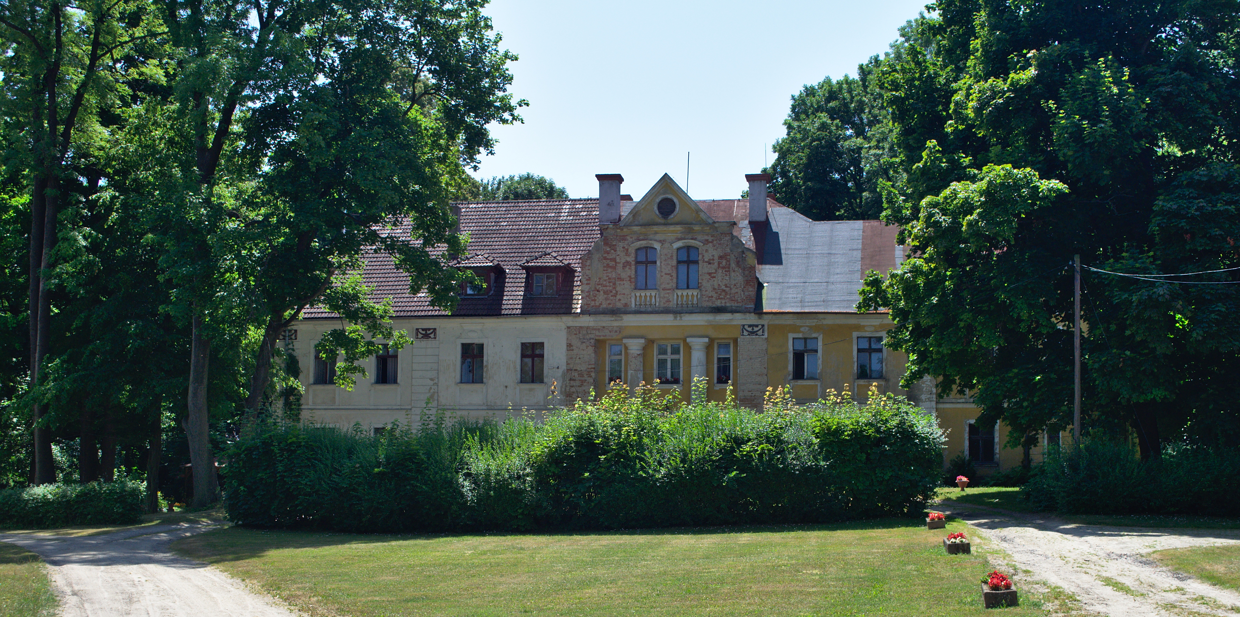 Jakuszowa - pałac, kon. XIX